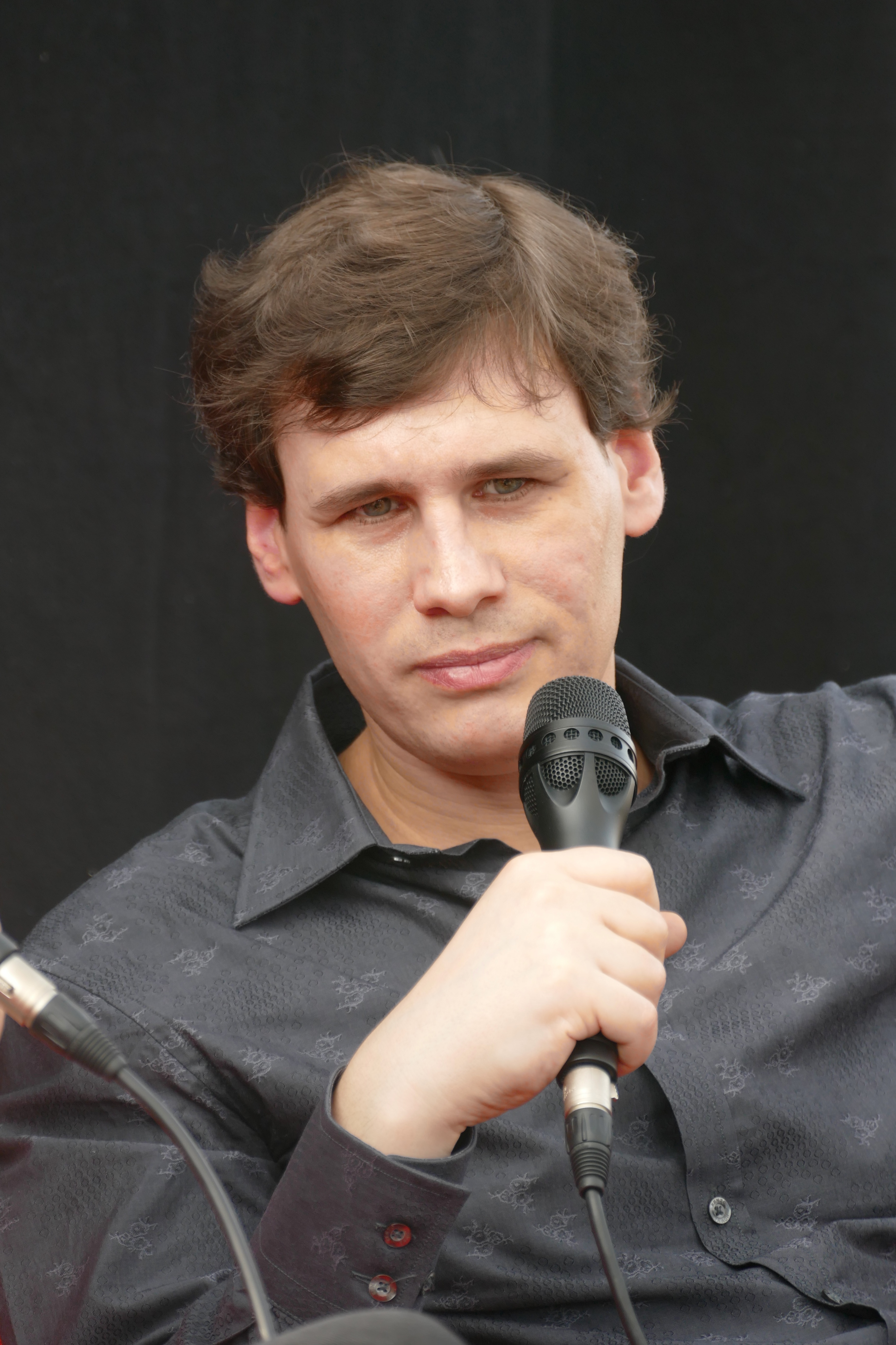 Steffen Popp spricht über seinen Lyrikband "118", der für den Preis der Leipziger Buchmesse 2017 nominiert ist.